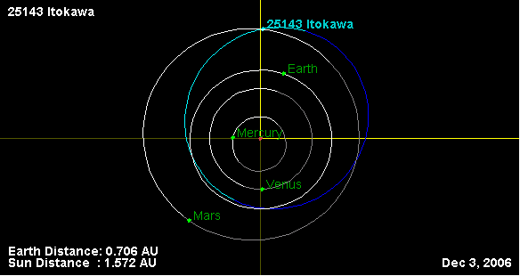 (25143) Itokawa's orbit